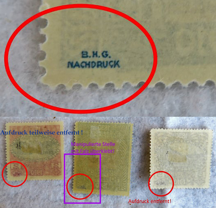 Beispiele für Briefmarkenfälschungen, bei denen der "Nachdruck"-Aufdruck entfernt wurde.